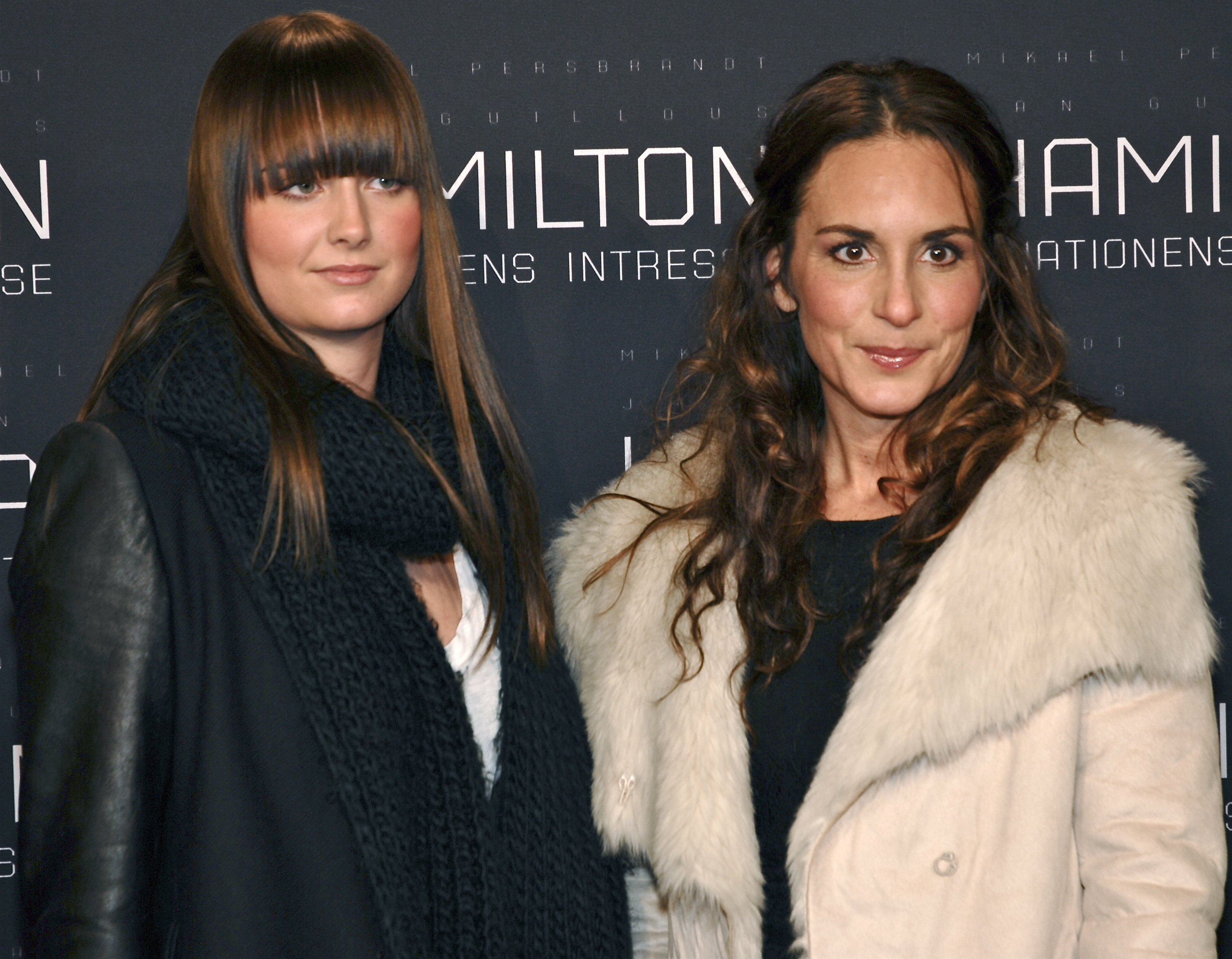 Josefina Rapaport och Alexandra Rapaport på galapremiären av Hamilton - I nationens intresse, på biograf Sergel i Stockholm den 9 januari 2012.